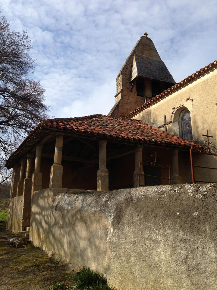 Photo de l'église en hiver